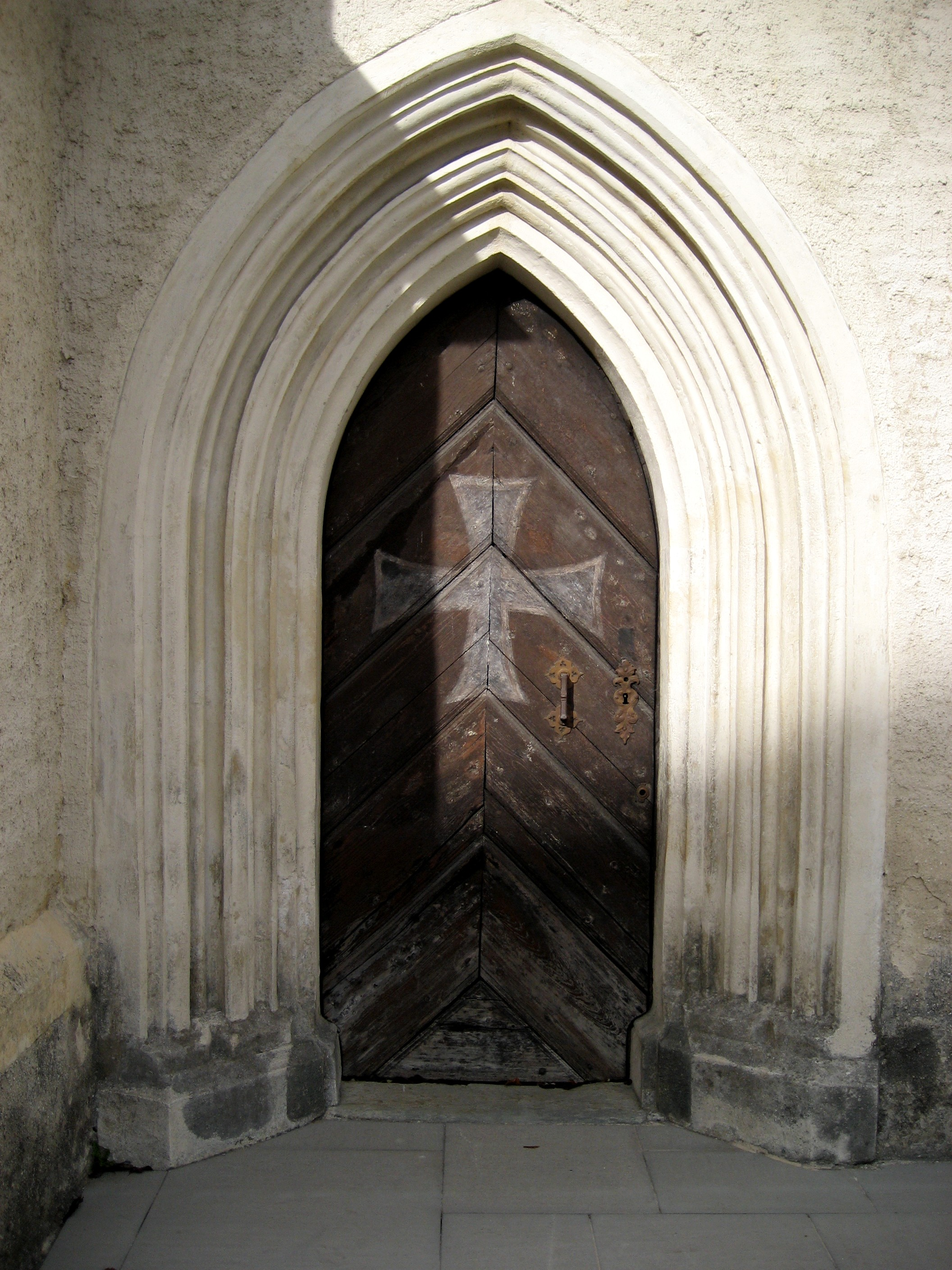 Leechkirche in Graz, älteste erhaltene Kirche der Stadt Graz; Portal an der Südwand mit Zeichen des Deutschen Ritterordens (Leechkirche in Graz, Austria)